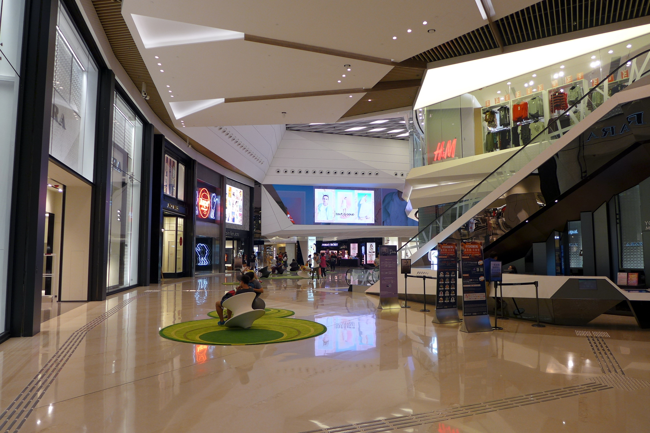 YOHO Mall Atrium